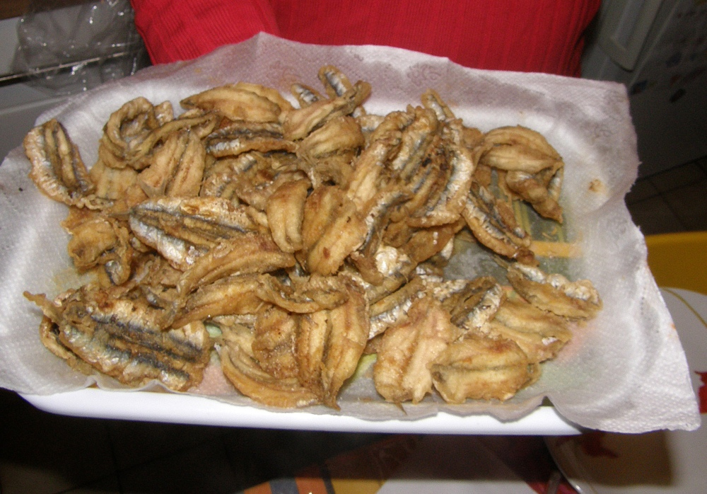 Zubereitung von frittierten Sartellen